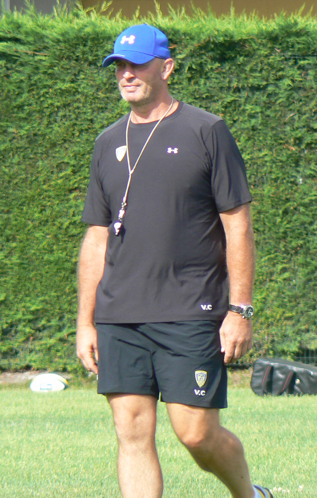 Le rugbyman et entraineur néo-zélandais Vern Cotter lors d'un entrainement avec l'ASM Clermont Auvergne.